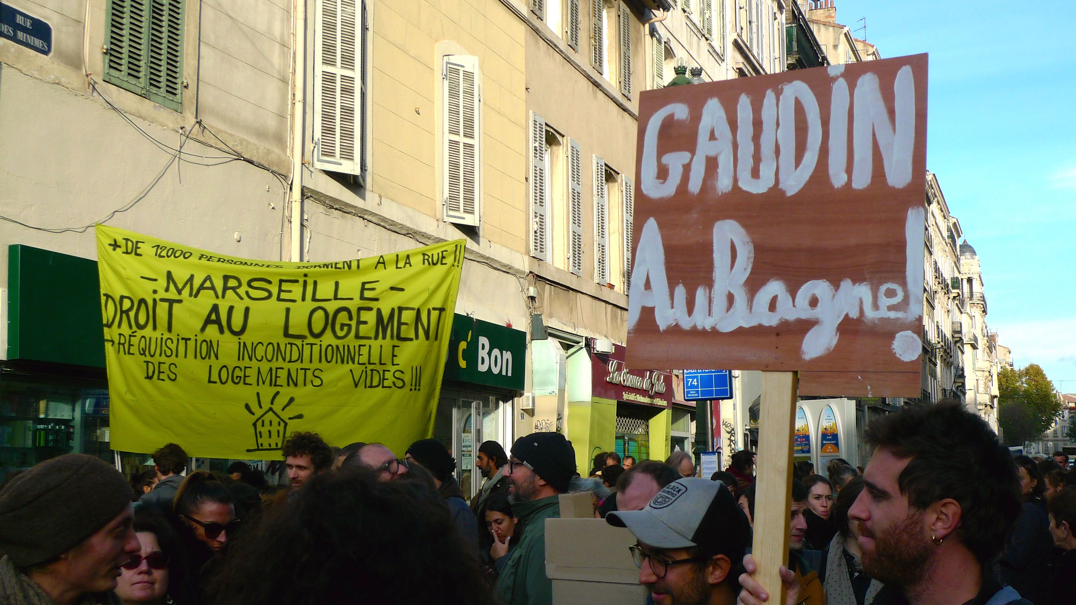 Manifestation suite aux effondrements des immeubles de la rue d'Aubagne, à Marseille, le 1er décembre 2018